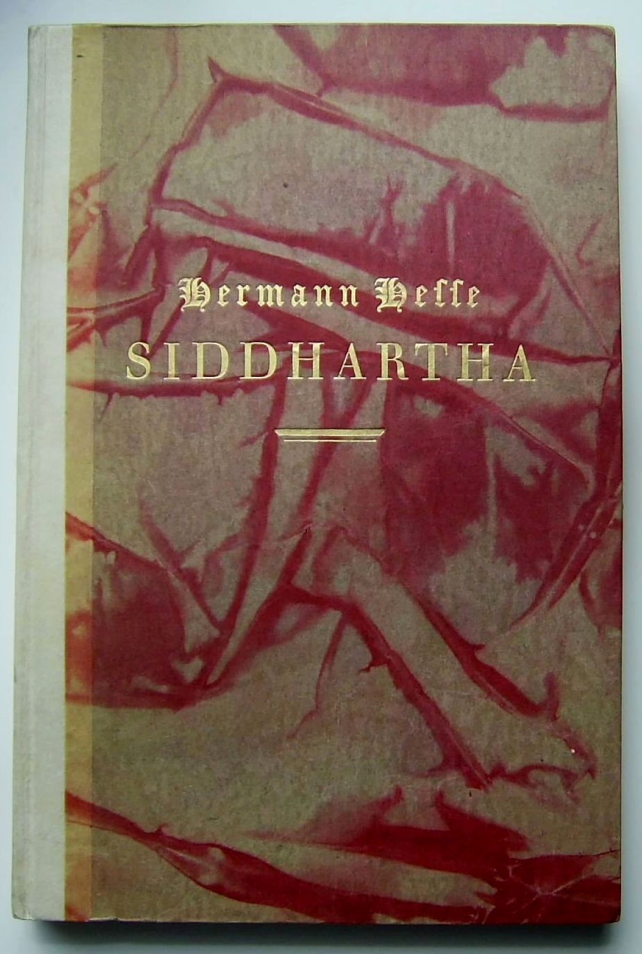 Siddhartha - 1 von 50 nummerierten und signierten Exemplaren der Vorzugsausgabe